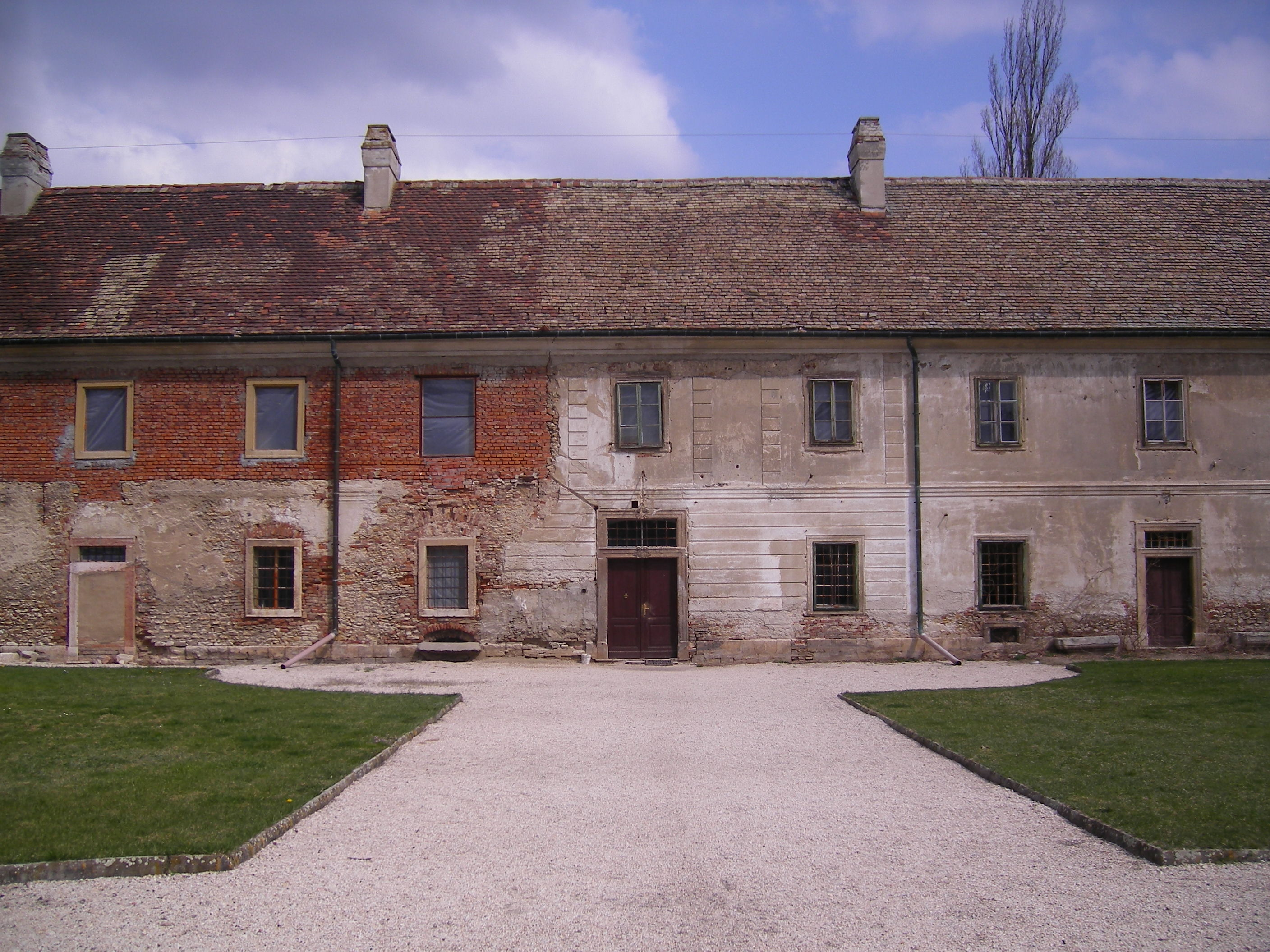 Oroszlány - majkpusztai kamalduli apátság